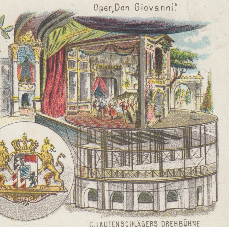 "Oper 'Don Giovanni'", "C. Lautenschlägers Drehbühne"; Drehbühne im Residenztheater München, Ansichtskarte, versandt 7. April 1898 innerhalb Münchens